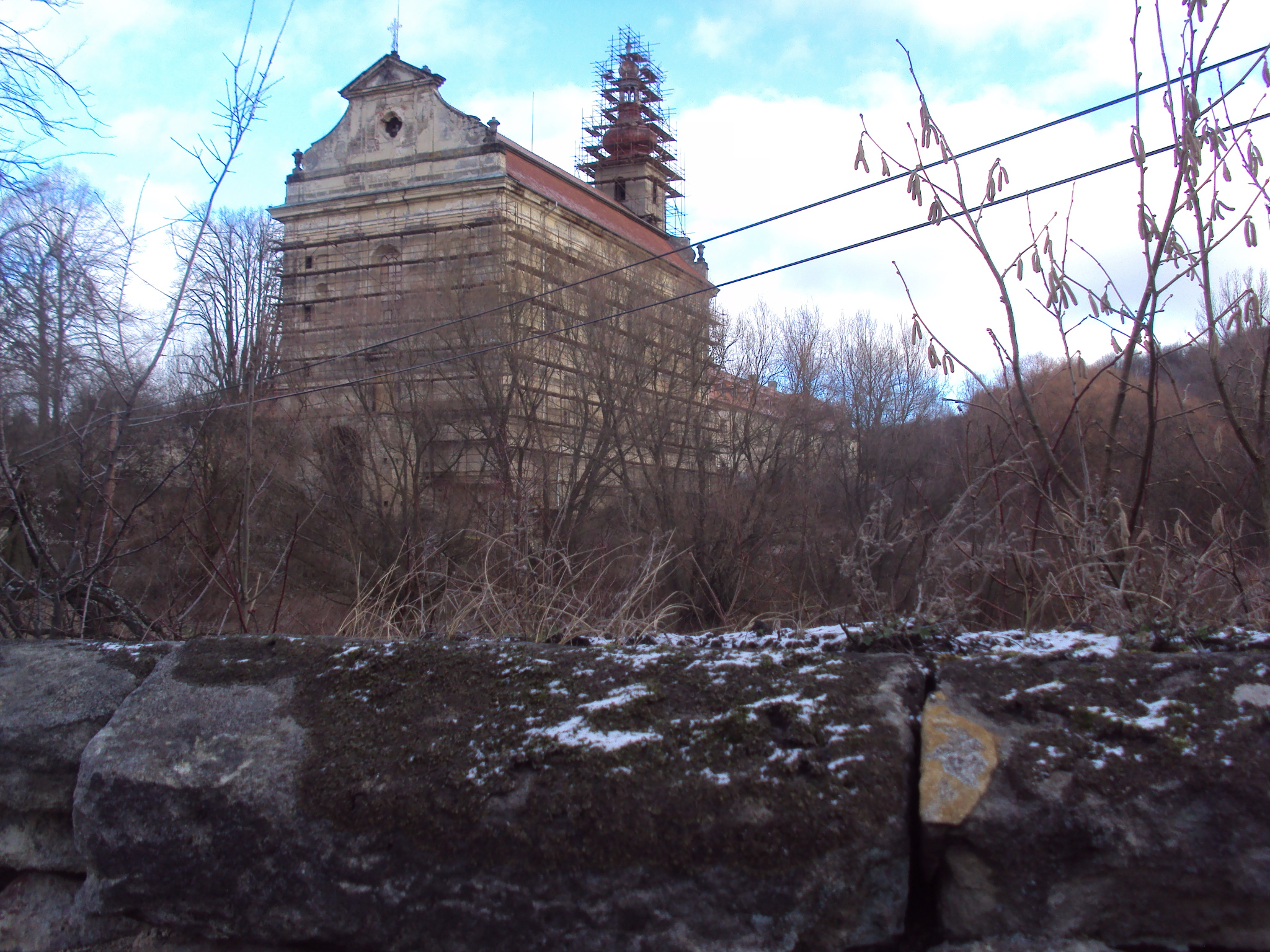 Areál zrušeného kláštera